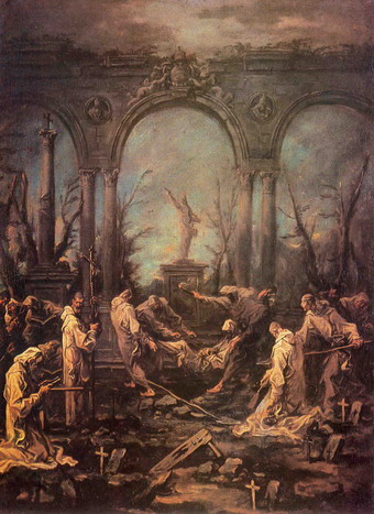 Алессандро Маньяско. Поховання ченця. Київ. Ханенки.